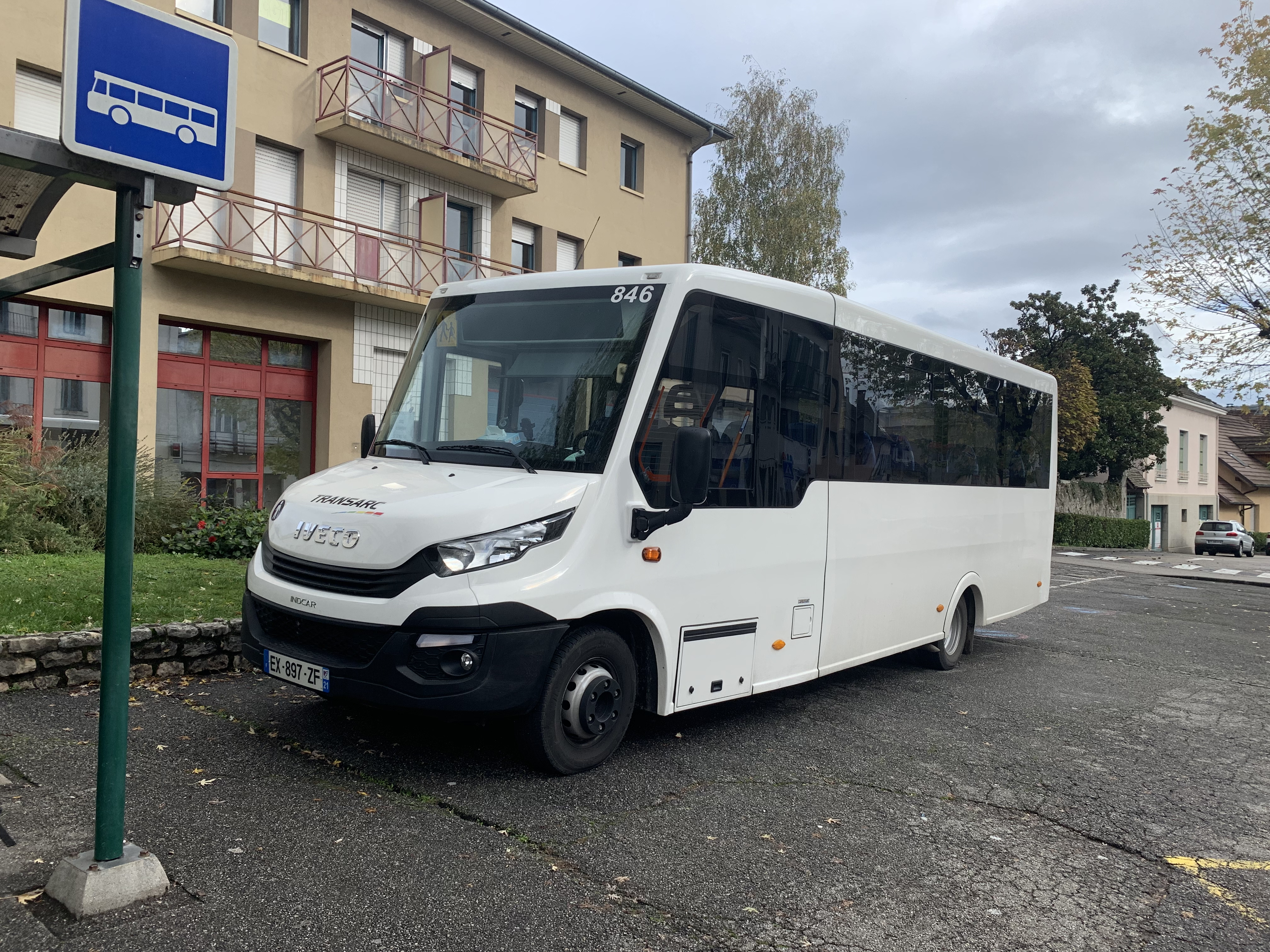 Boulevard du Mail (Belley), novembre 2019, bus garé.